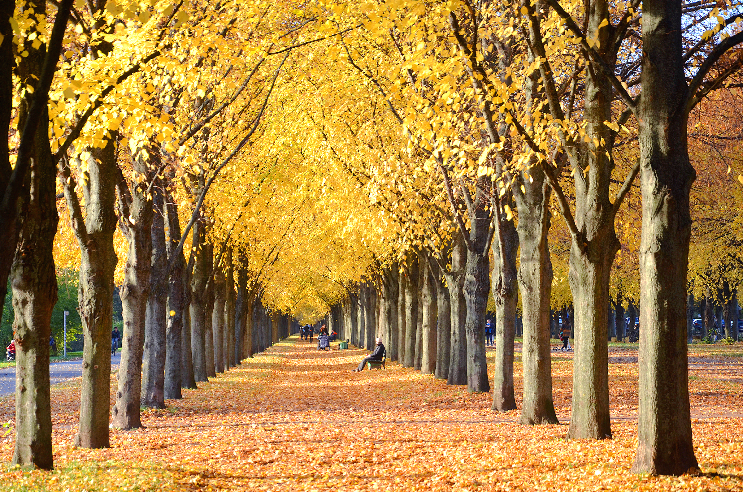 Einmal eine Pause machen von den Computern im Wikipedia-Büro Hannover und - zu Fuß in wenigen Minuten zu erreichen - zu zweit das Schauspiel der Linden im Goldenen Oktober in Hannovers Georgengarten einfangen. Licht tanken, Farben für die Seele, den Menschen ein Lichtbild schenken, vom Nachmittag des 26. Oktobers 2015 in der Herrenhäuser Allee (mit Blick in Richtung des Großen Gartens Hannover Herrenhausen ...